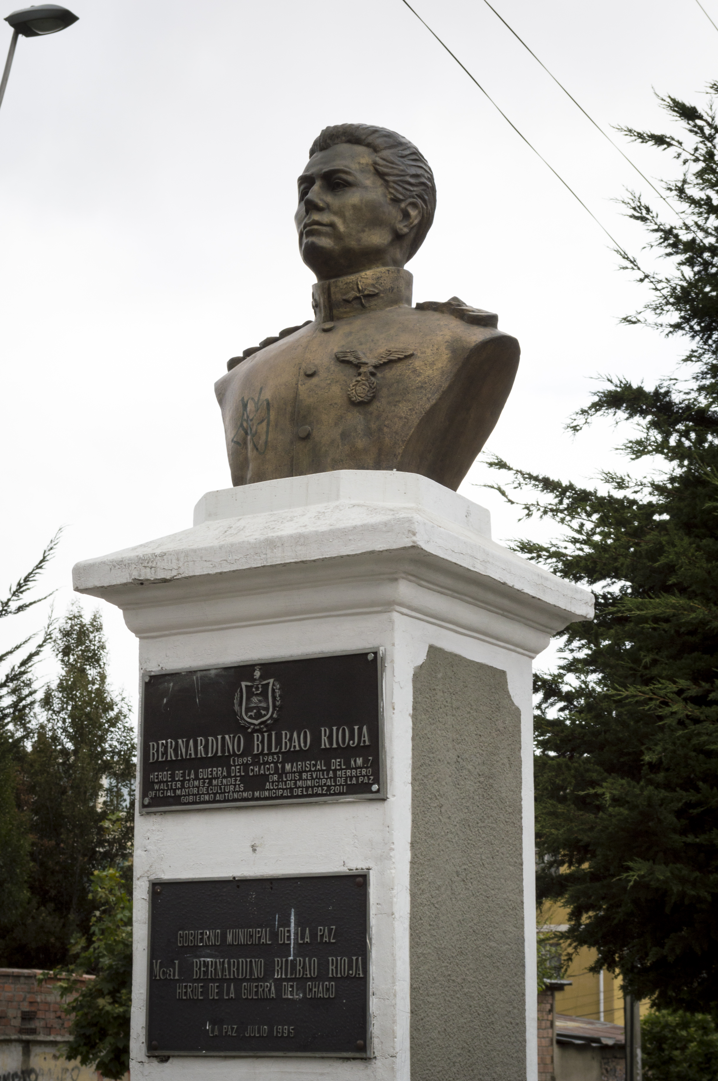 Bernardino Bilbao Rioja Avenida Busch, La Paz - Bolivia This medium shows the protected monument with the number L/00-209 in Bolivia.